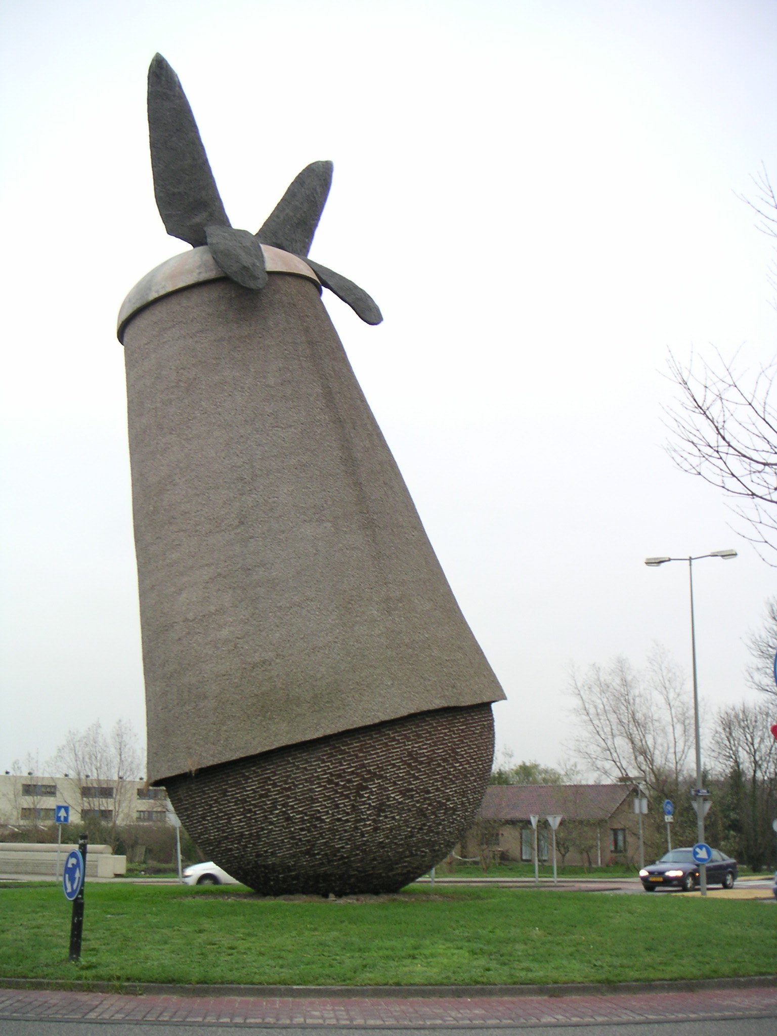 1998 Vlindermolen, rotonde Anderlechtlaan/Sloterweg in Amsterdam